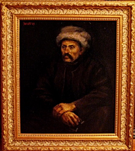 Портрет на налбантина Стойко Зиков от с. Лесново. Неизвестен автор от началото на 20 век.